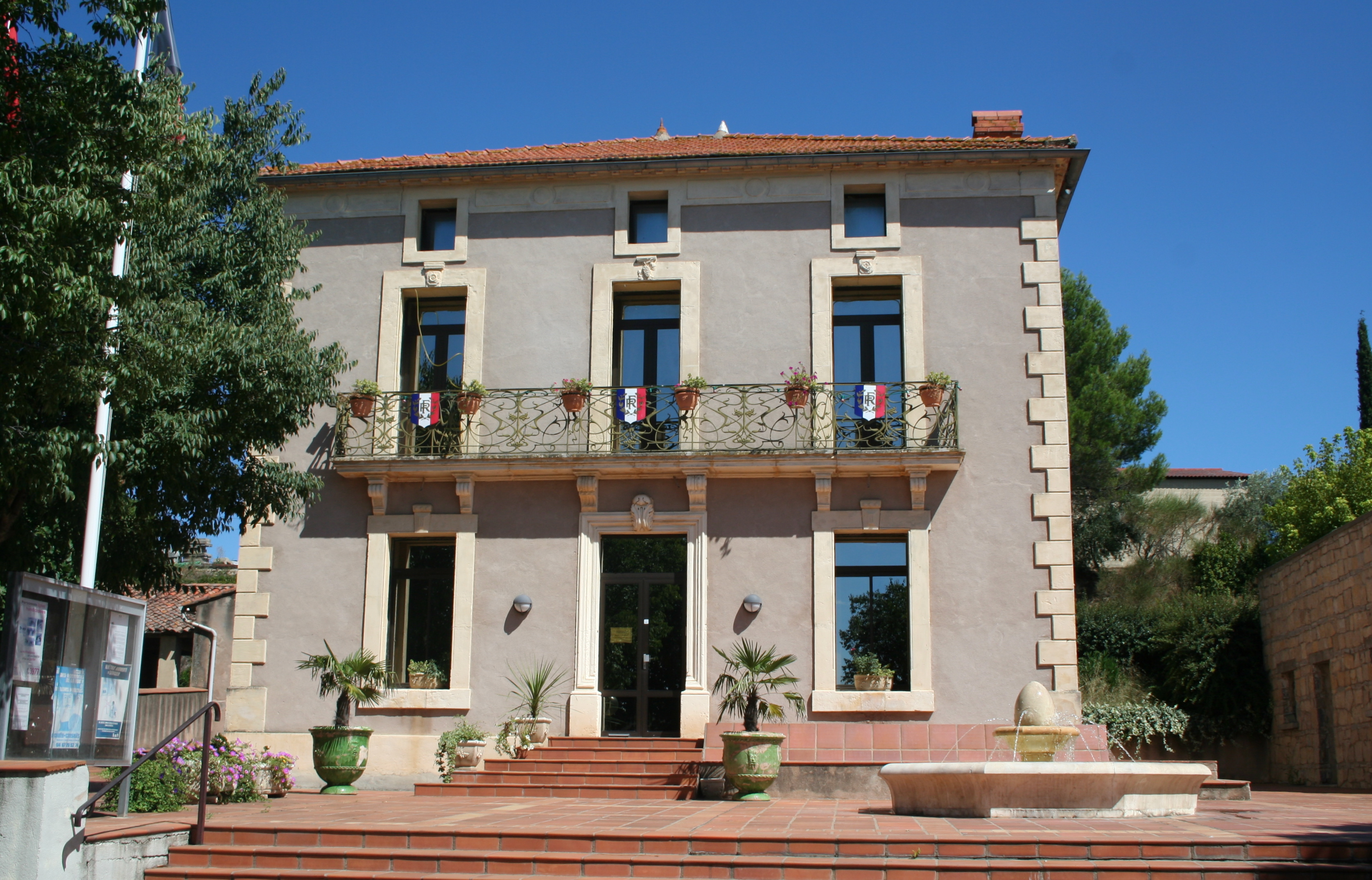 Abeilhan (Hérault) - mairie.